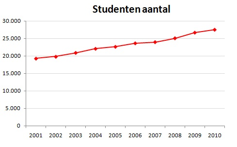 Totaal aantal studenten aan de Rijkuniversiteit Groningen per jaar.